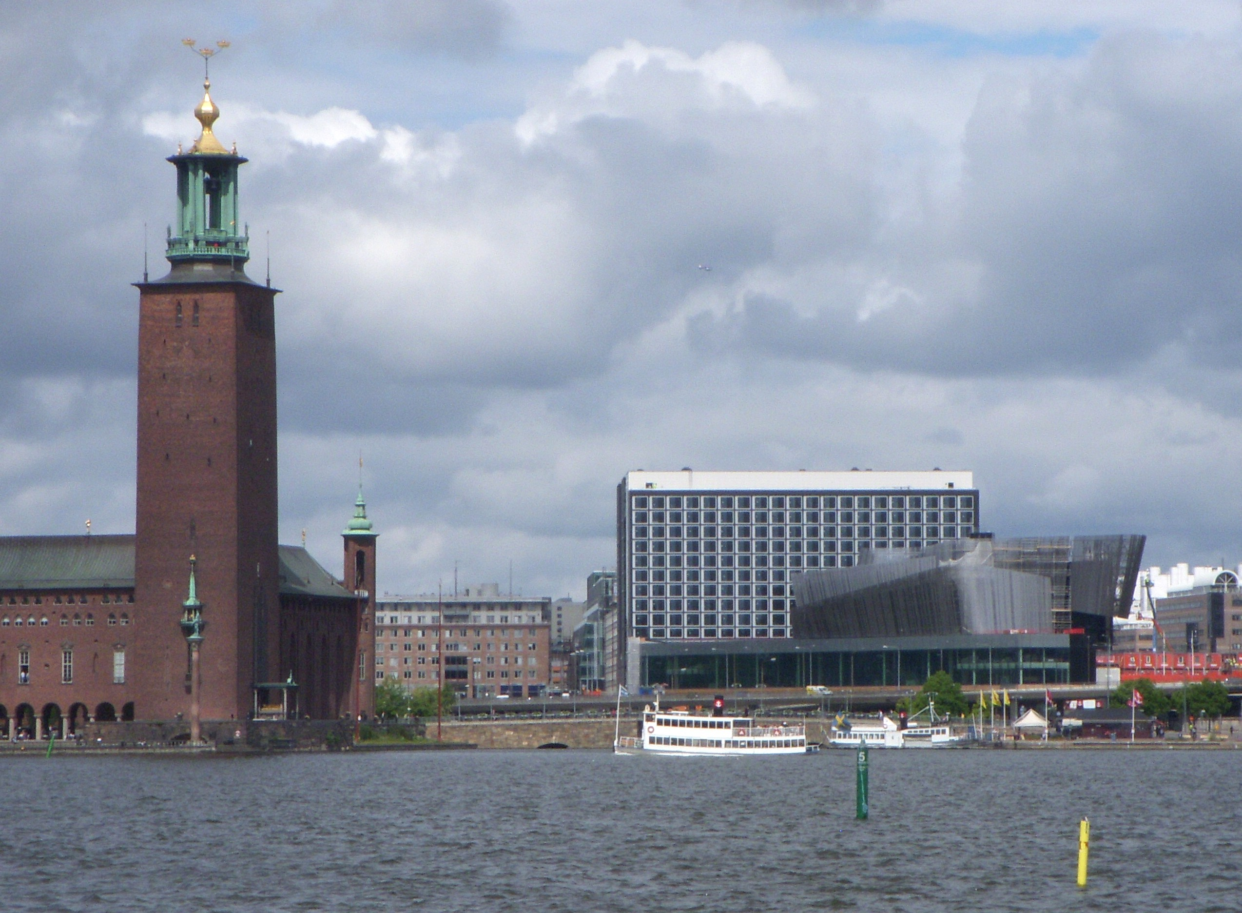 Stockholms stadshus och Stockholm Waterfront